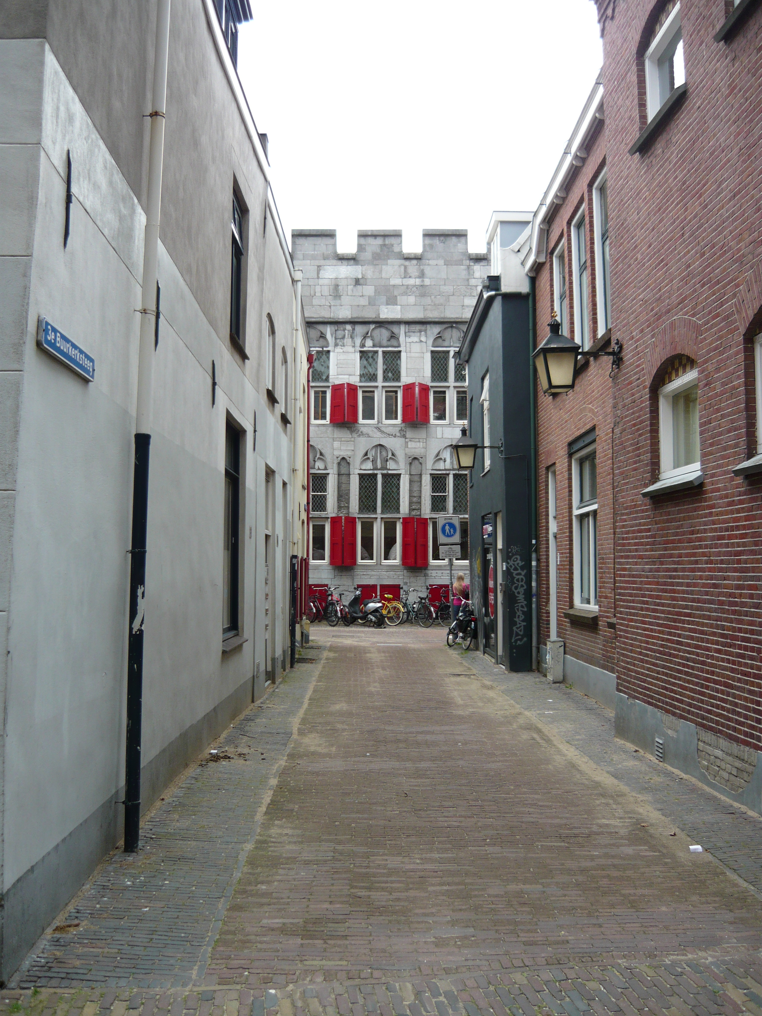 Deel van Huis Zoudenbalch gezien door de 3e Buurkerksteeg. De steeg loopt van het huis Zoudenbalch naar de Buurkerk en is reeds omstreeks 1460 ontstaan met Evert Zoudenbalch, een voorname eigenaar van dit huis. . 9″ N, 5° 07′ 06.02″ E